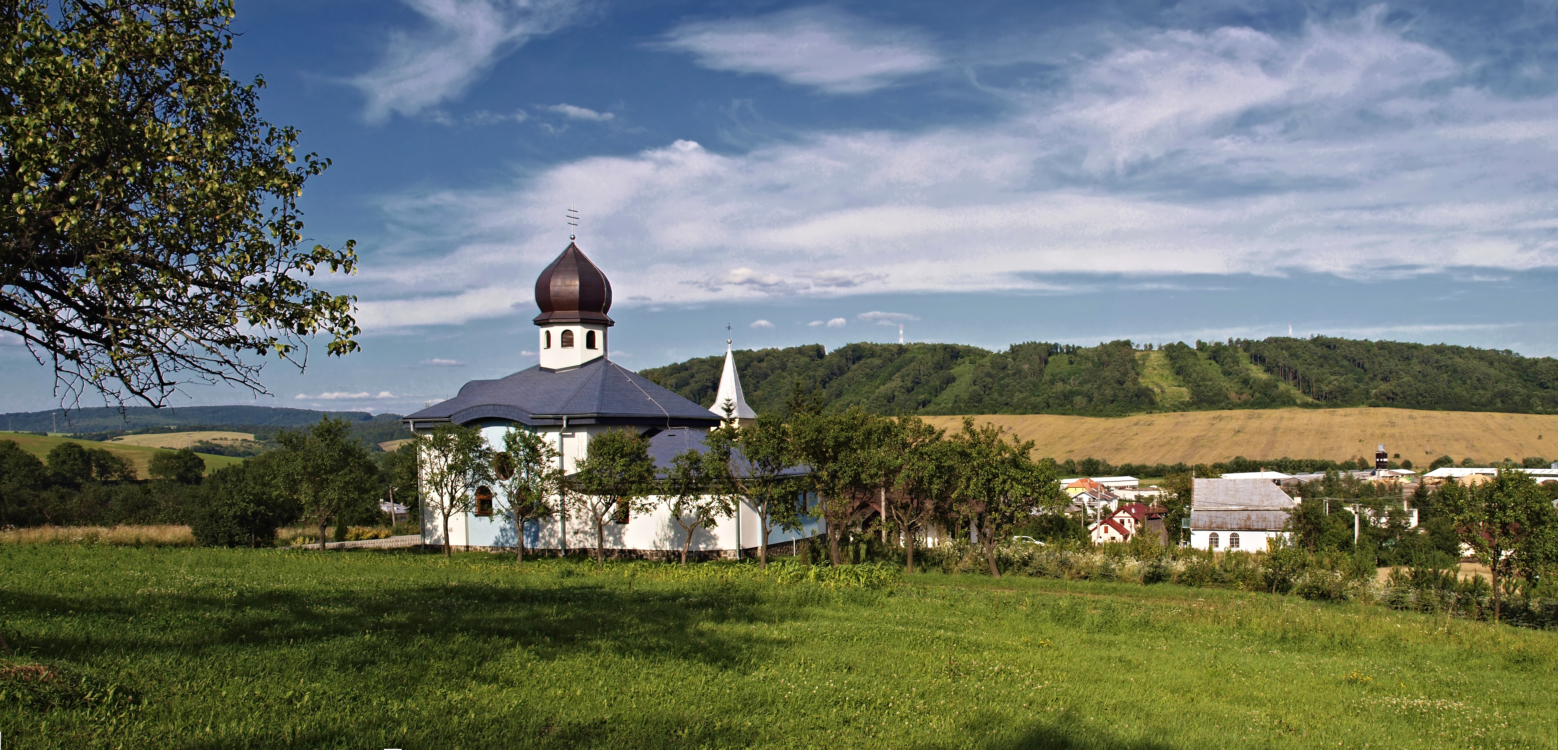 Topoľovka (Slovakia) - Vue du village et de l'église catholique grecque